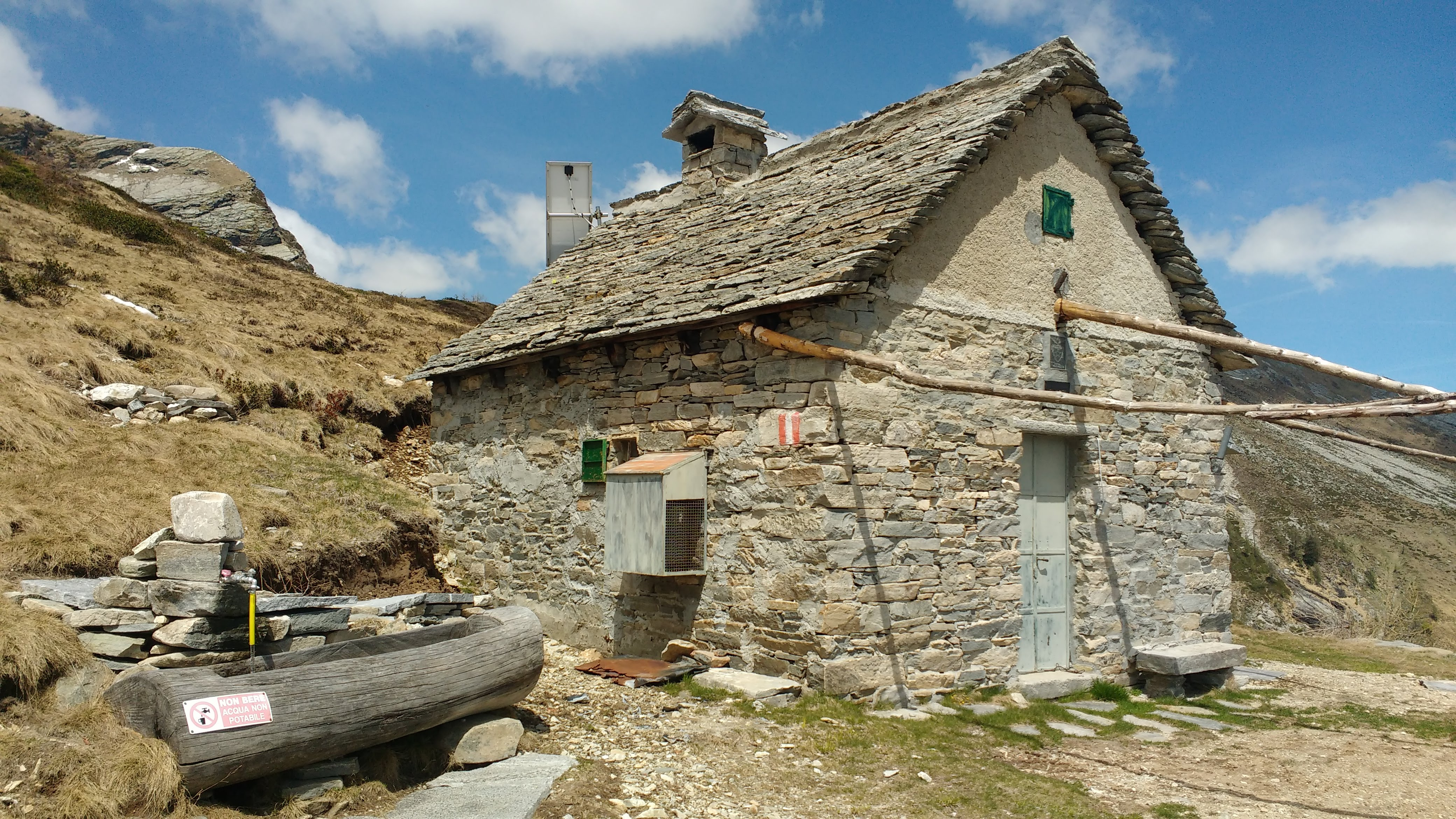 Bivacco Emilio Greppi ai laghetti di Muino, Val Vigezzo